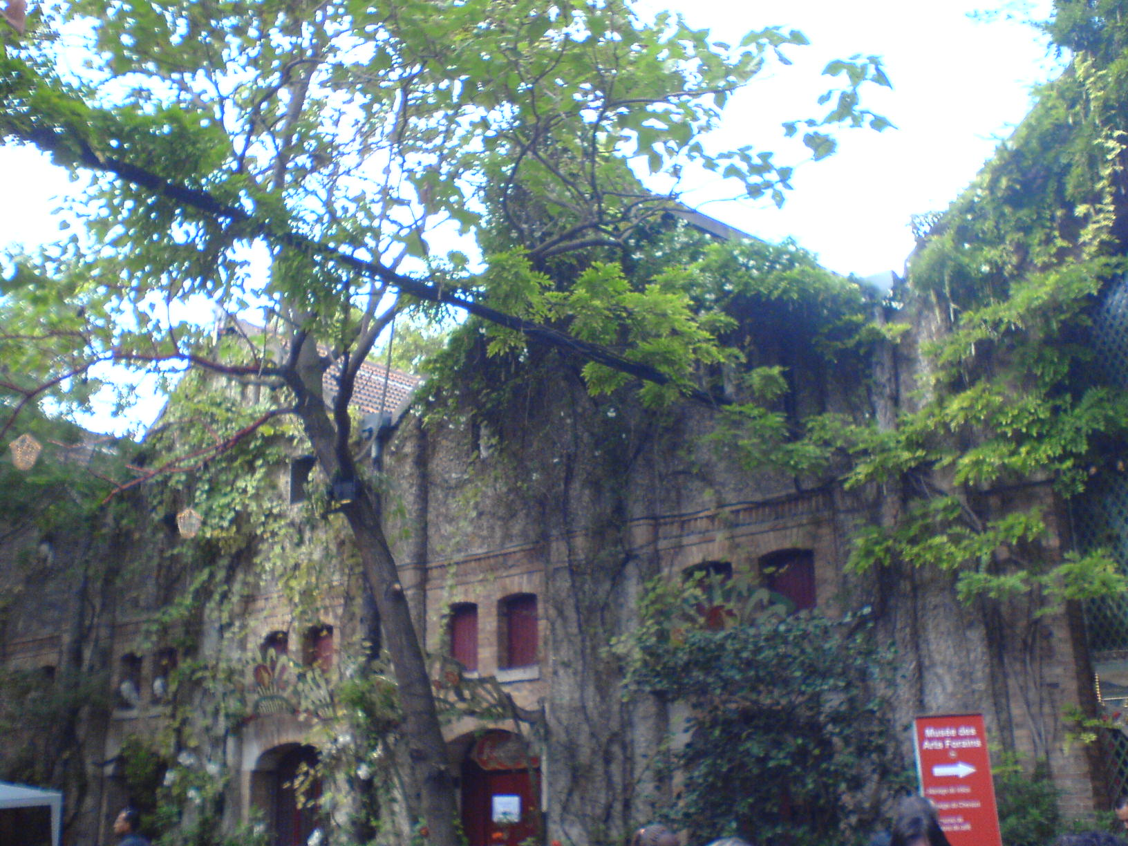 Vue générale du Théâtre de verdure, c'est-à-dire de l'allée centrale du Musée des arts forains, une voie pavée entre deux rangées de bâtiments couverts de lierre où ont lieu diverses animations de théâtre de rue. Musée des arts forains, dans le 12e arrondissement de Paris, en France. Septembre 2017.